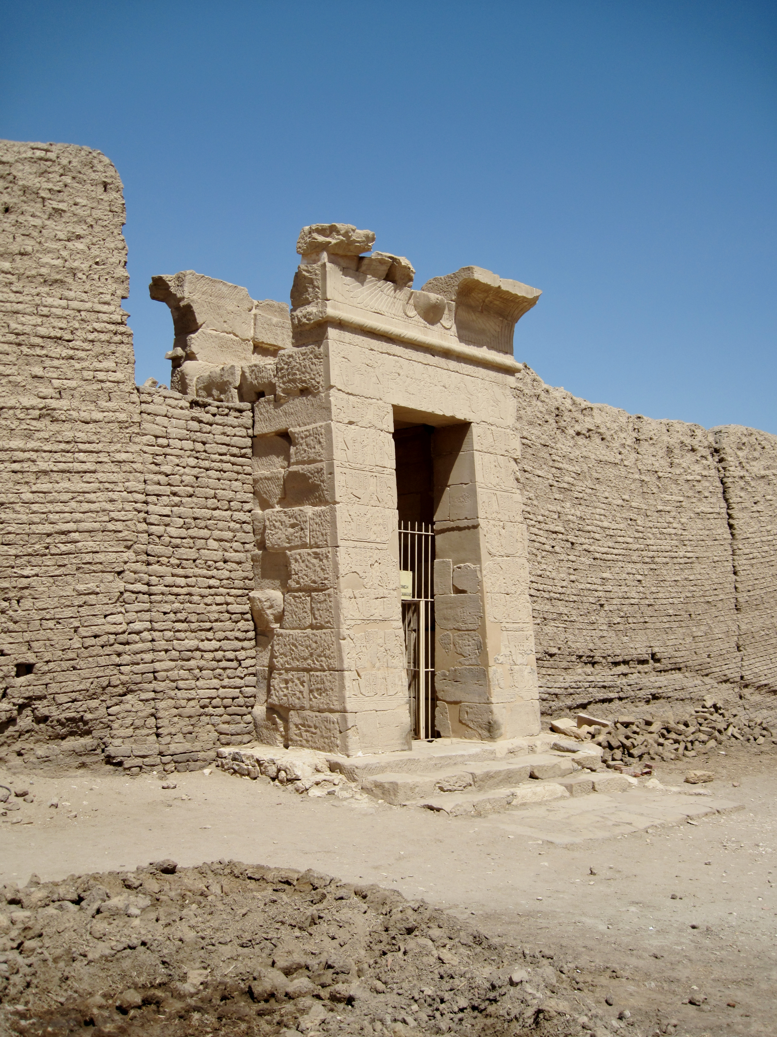 Eingang zum Hathor-Tempel von Deir el-Medina („Kloster der Stadt“), altägyptisch Set Maat („Platz der Wahrheit“), in Theben-West bei Luxor, Ägypten